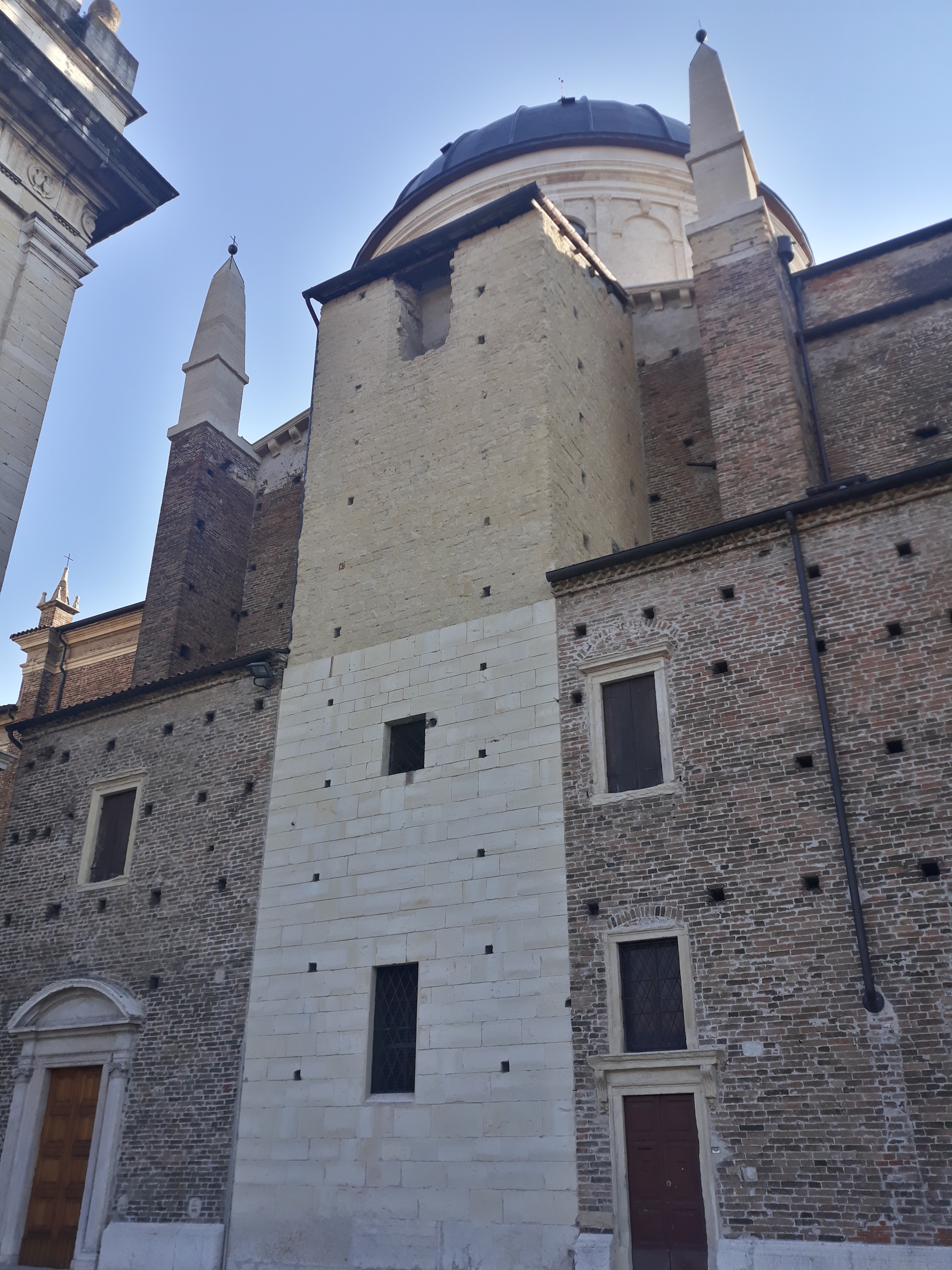 Vecchio campanile romanico della chiesa di San Giorgio in Braida a Verona